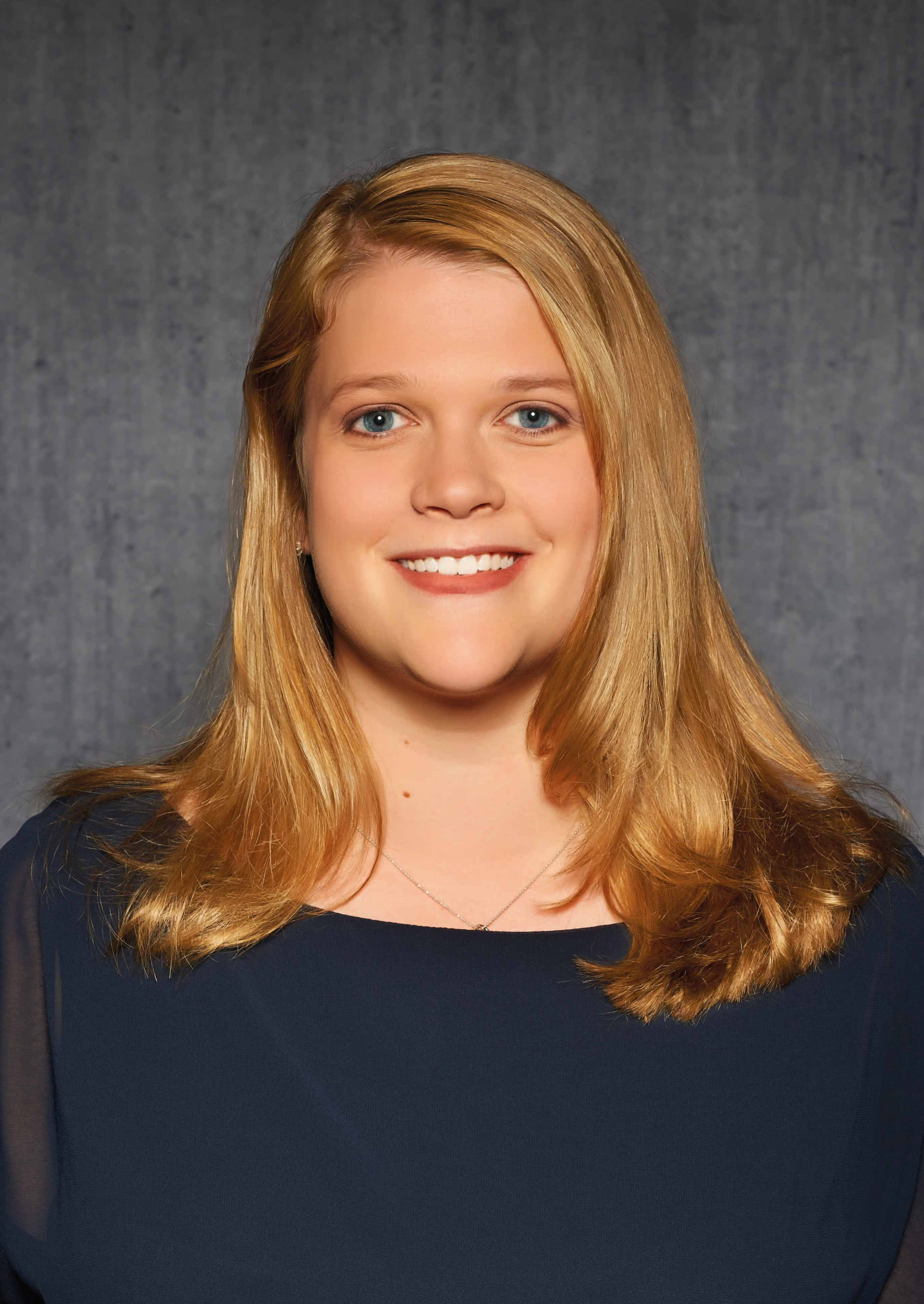 Bild von Annkathrin Kammeyer zur Bürgerschaftswahl 2015